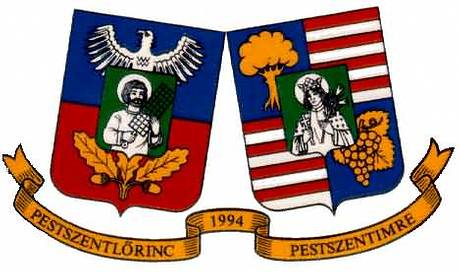 coat Budapest 18 district